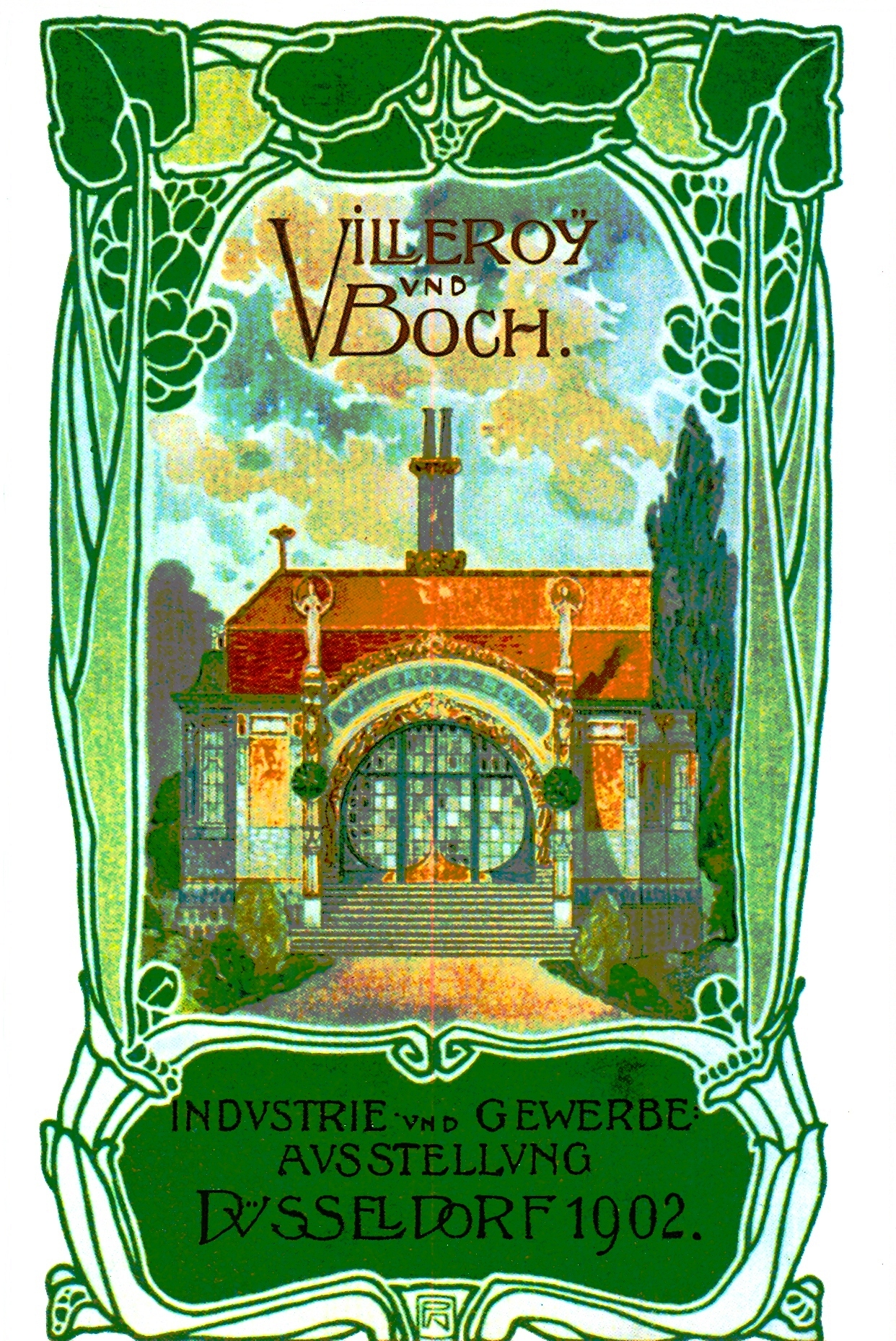 Düsseldorf, Majolikahäuschen von Villeroy & Boch im Düsseldorfer Hofgarten, erbaut nach Entwürfen von Anton Joseph Pleyer im Jahre 1902, abgebrochen 1926, 1.jpg